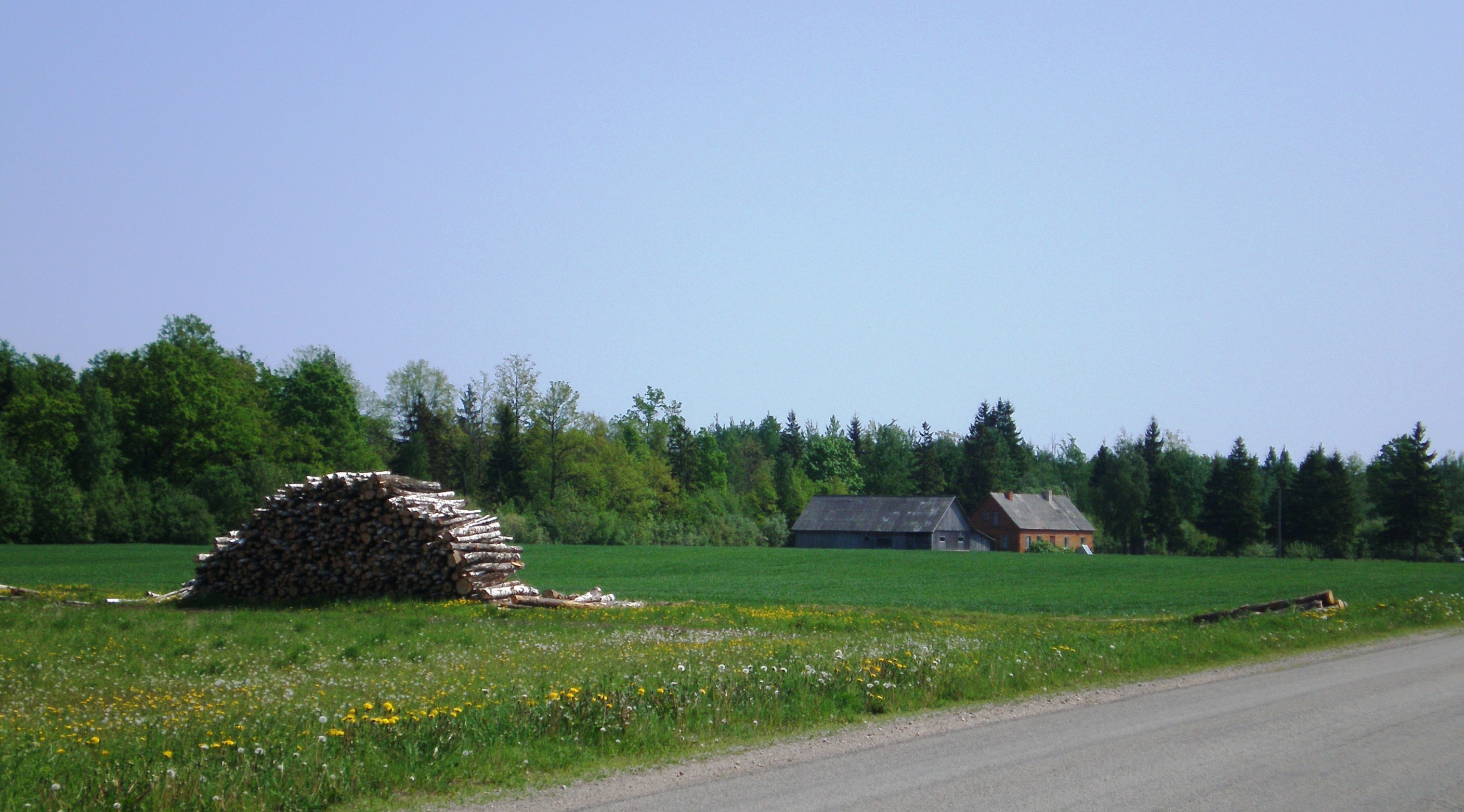 Krakių kaimas, Kėdainių raj.